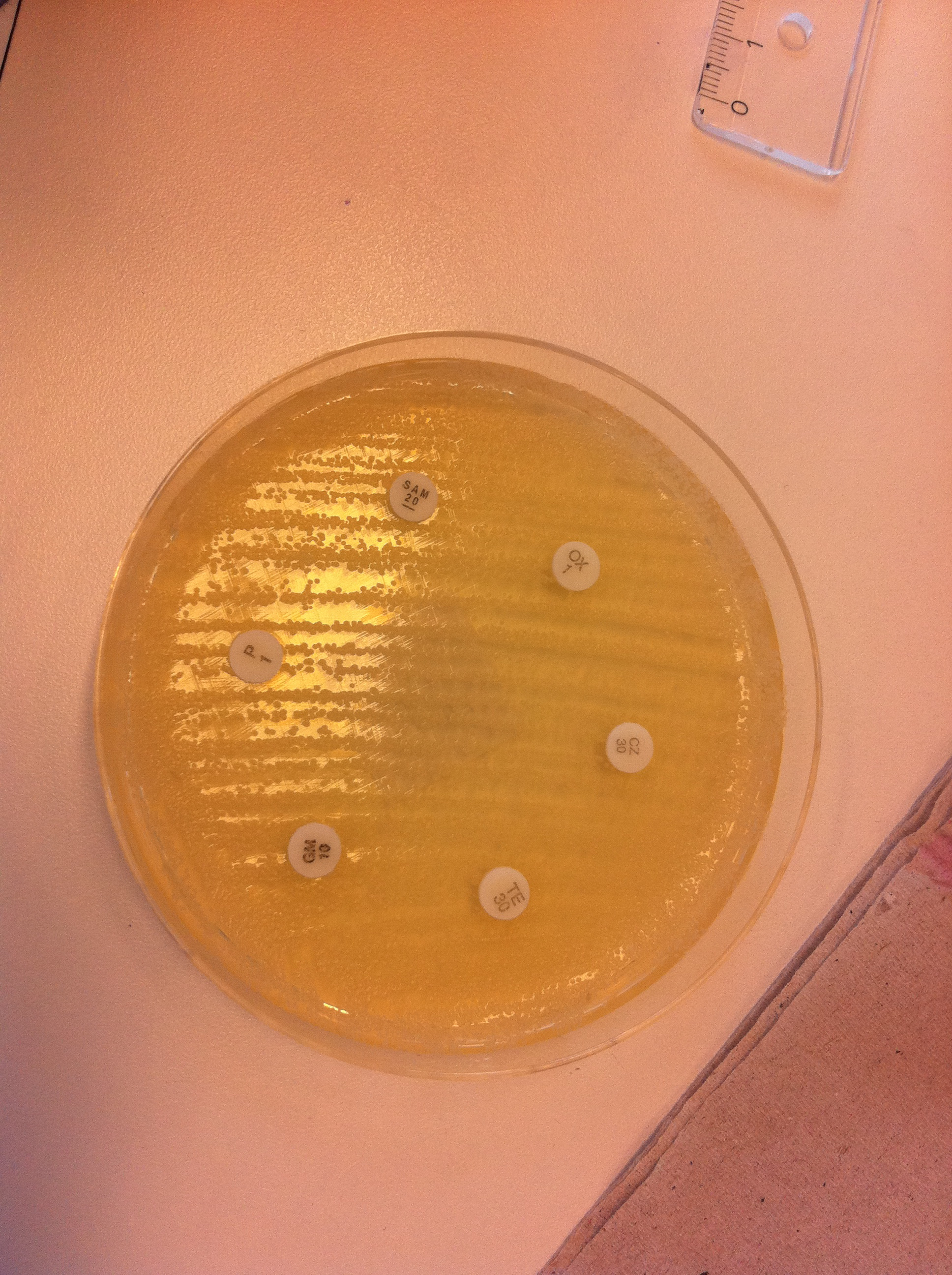 Antibiogramm eines Schimmelpilzes der Gruppe "Aspergillus". Wie erwartet zeigen sich keine Hemmhöfe, da Pilze nicht auf Antibiotika ansprechen.